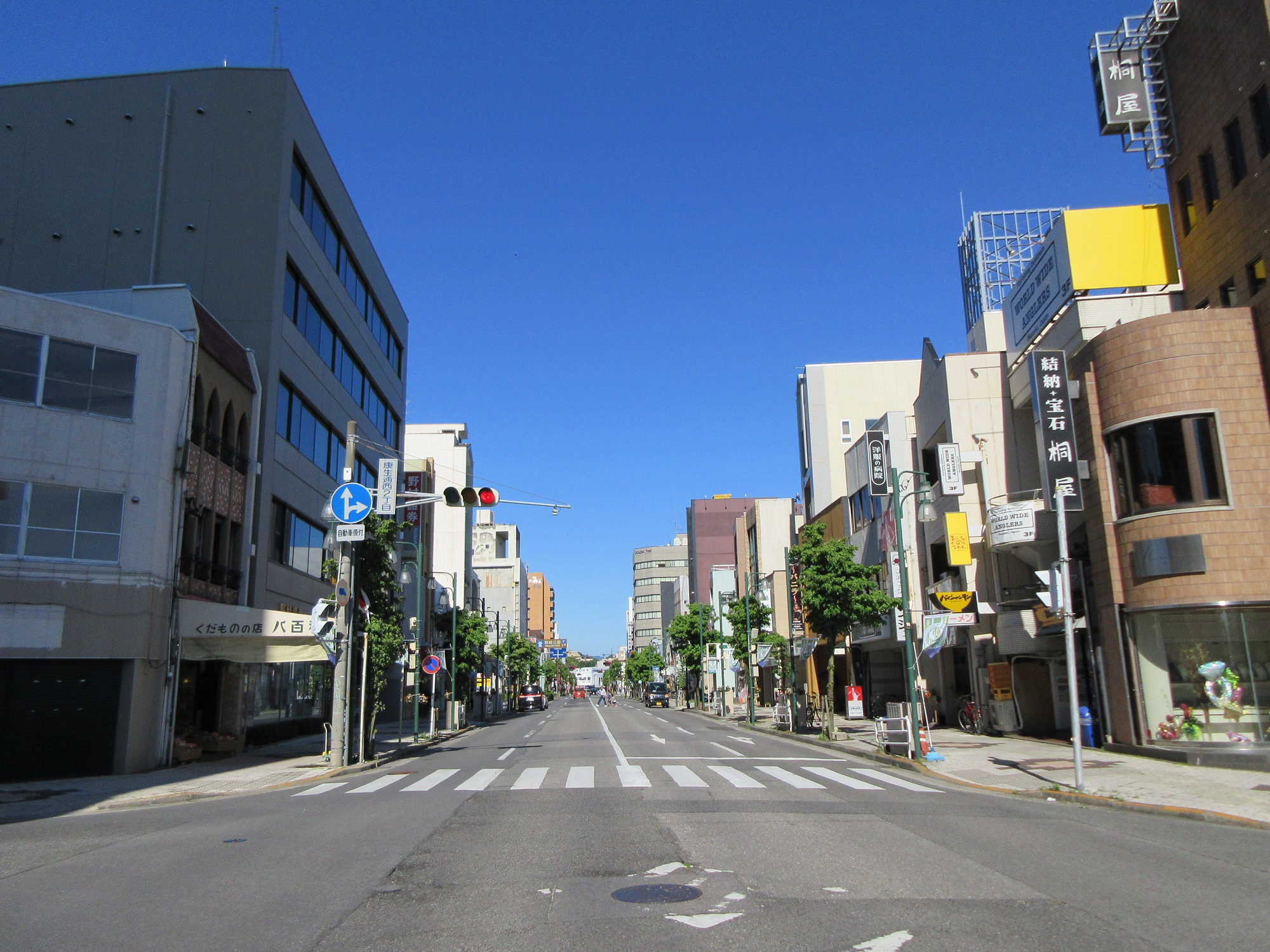 岡崎市、康生通西2丁目交差点